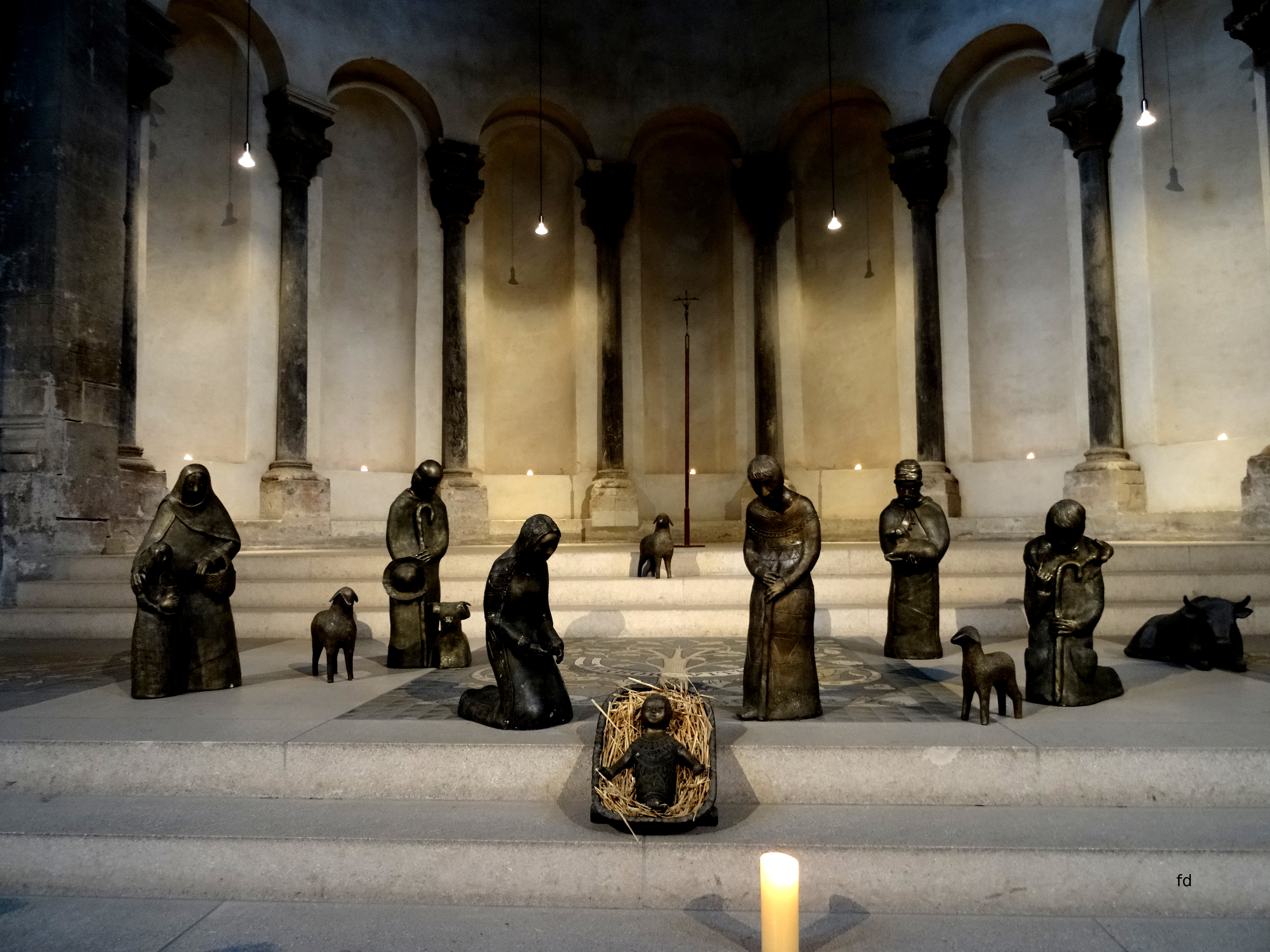 Ruhe am Weihnachtsabend